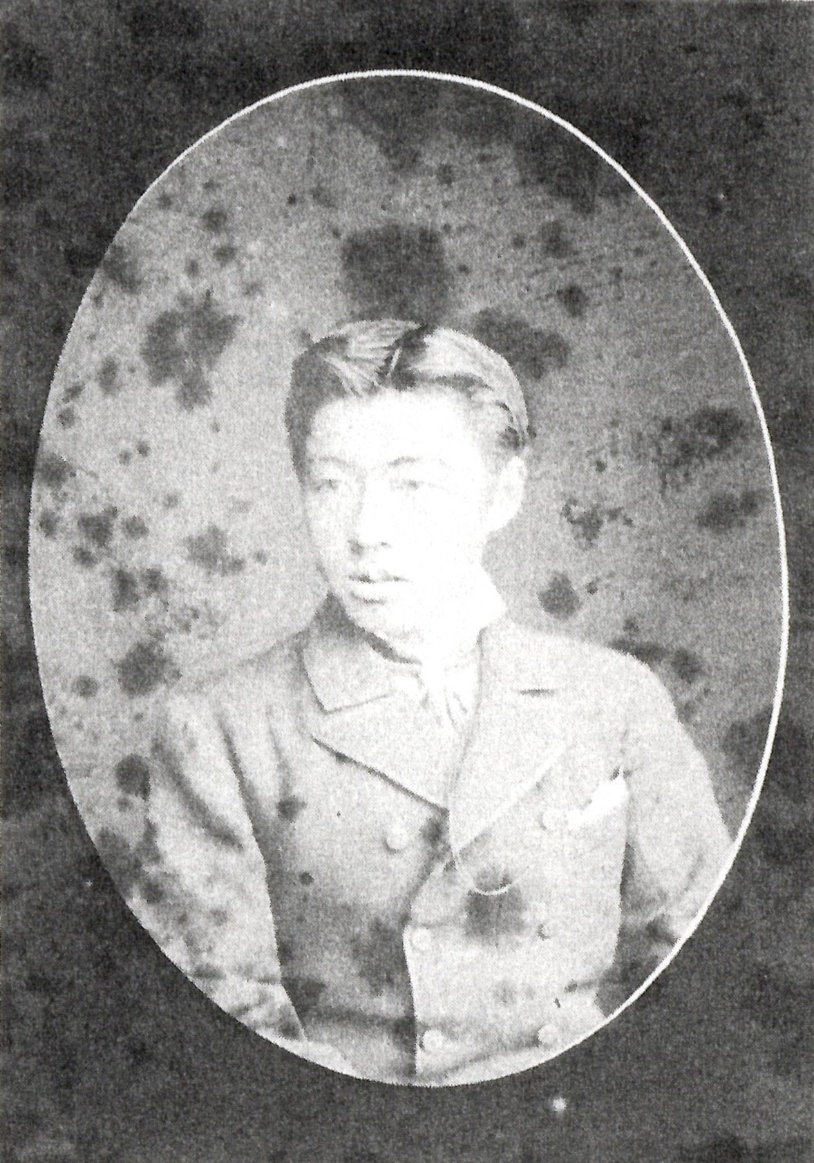 桑名藩知事松平定教の肖像写真。